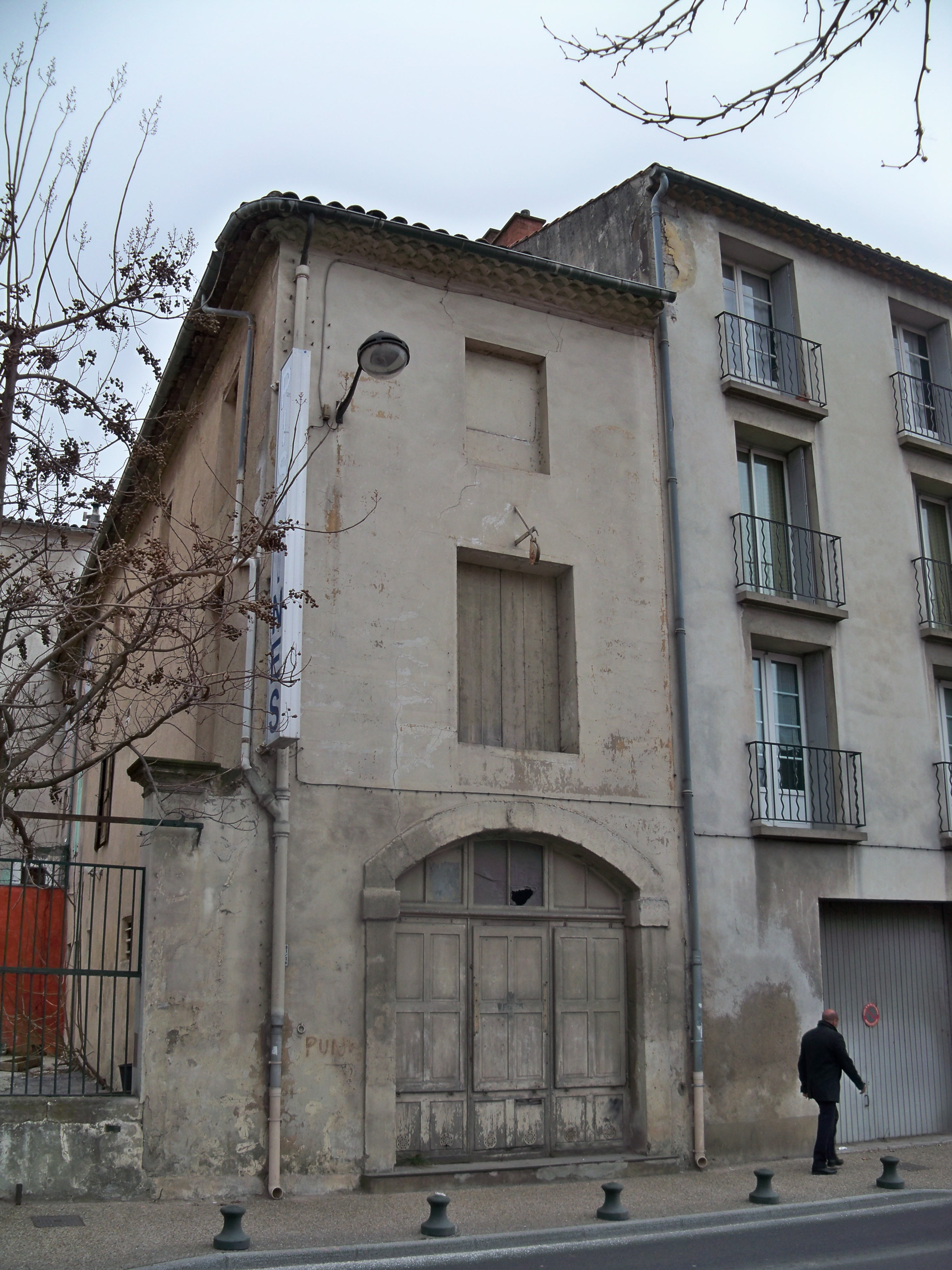 maison en hauteur à Apt (84), France